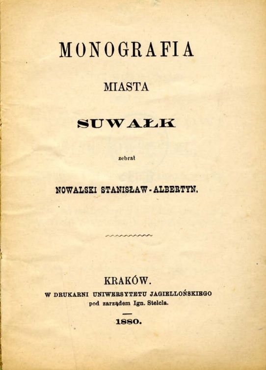 Strona tytułowa napisanej przez Stanisława Nowalskiego "Monografii miasta Suwałk". Wyd.: Kraków 1880 r.